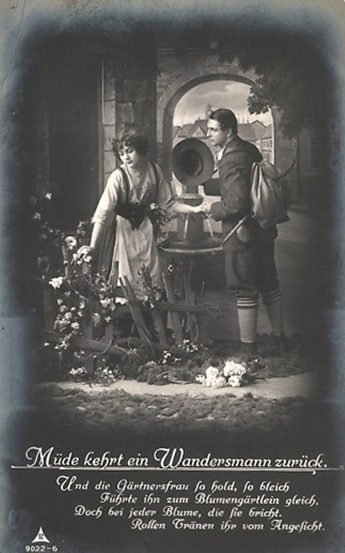 Postkarte mit Bild und Text Müde kehrt ein Wandersmann zurück. Die Postkarte ist adressiert an "Fräulein Luise Tritz" in Böckingen. Der Poststempel hat das Datum 26. 6. 14. Der handschriftliche Kartentext lautet: "Viele Grüße sendet Dir Dein Bruder Friedrich". Als Gruß des Bruders an die Schwester dürfte es bereits ein ironisch gemeintes Zitat sein.